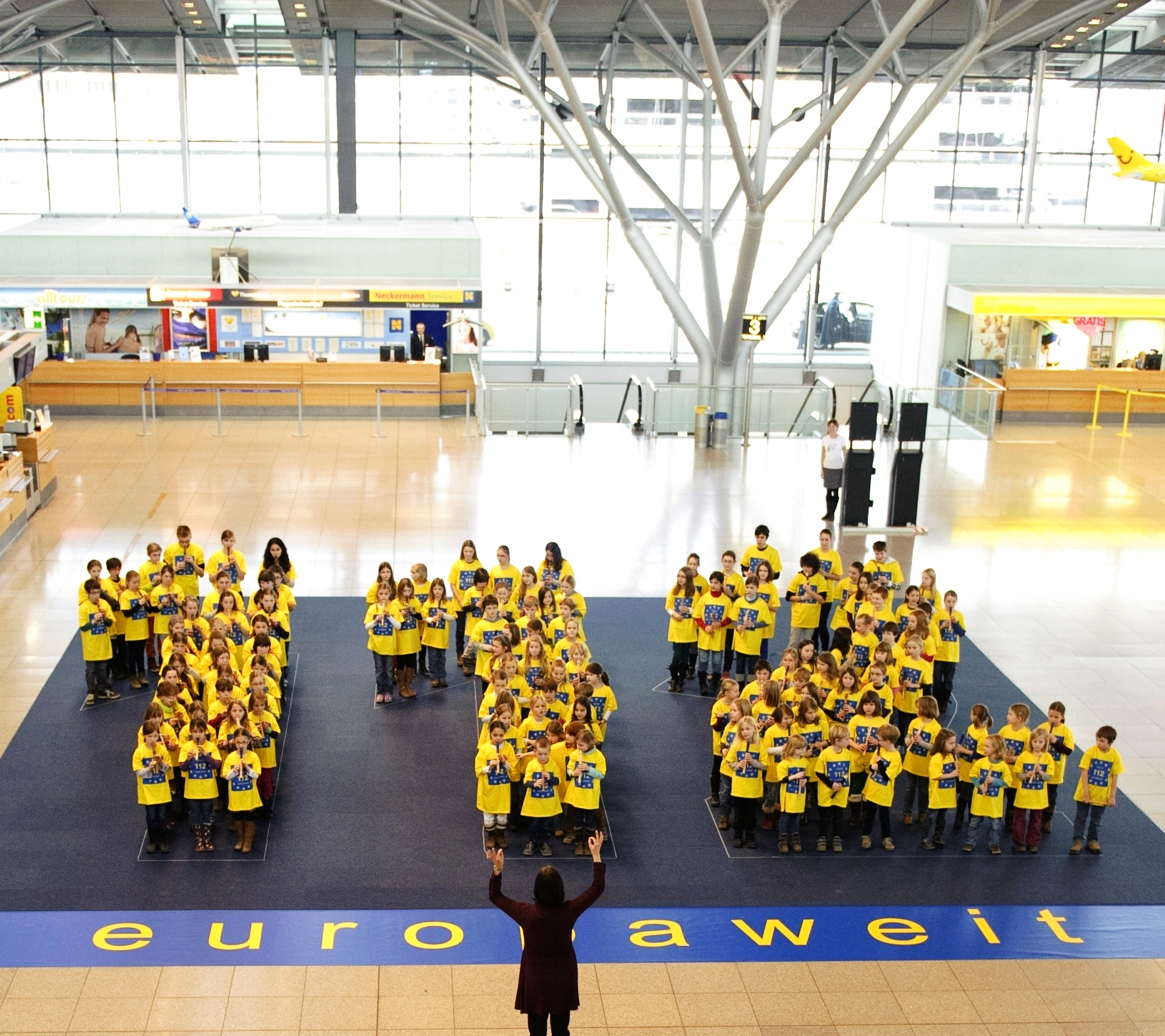 Am 11.2.2014 spielten auf dem Flughafen Stuttgart Schülerinnen und Schüler der Musikschule Leinfelden-Echterdingen, Schönbuch und Stuttgart anlässlich des Euronotruftages die Europahymne.